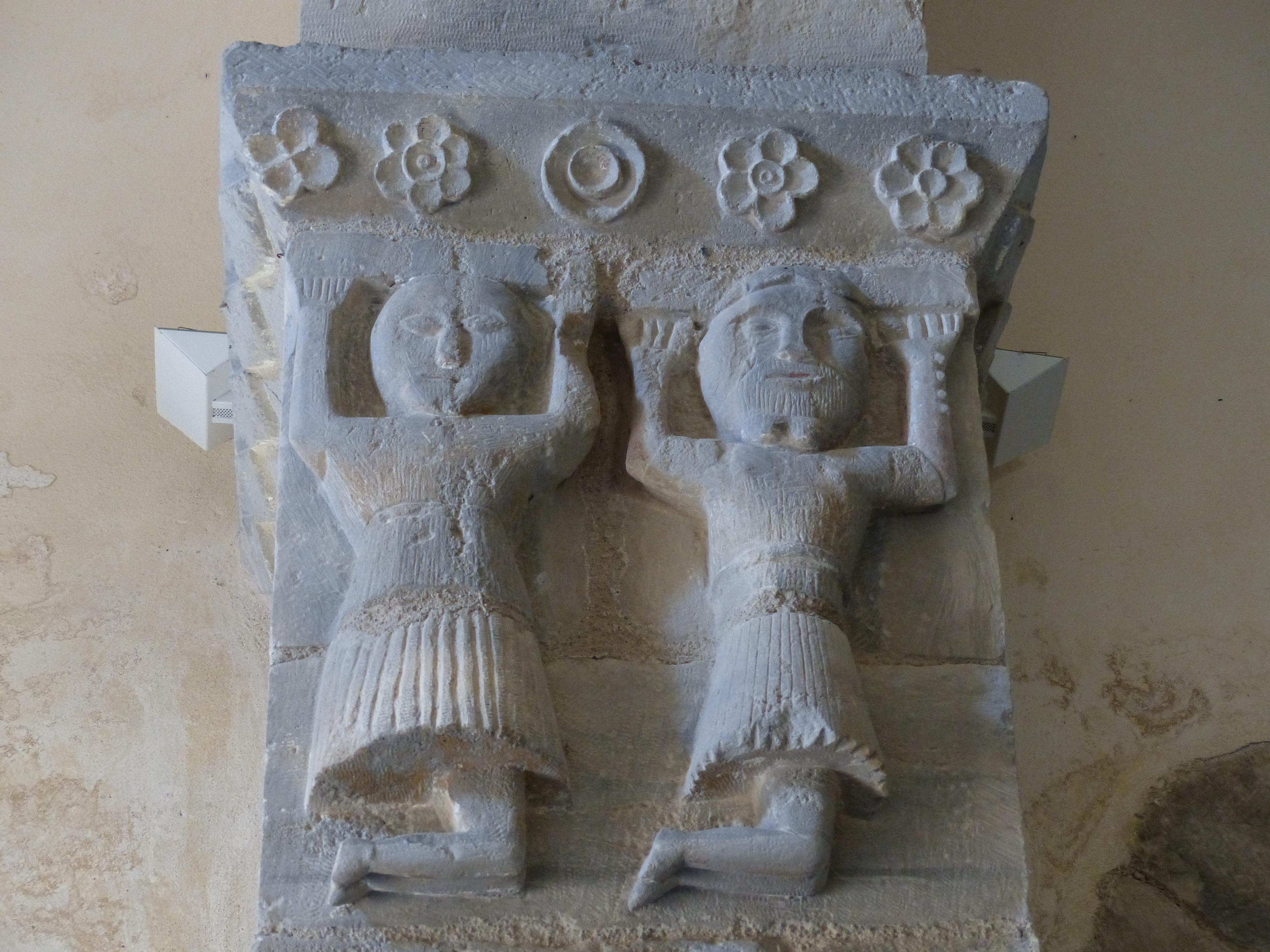 Chirat-l'Église (Allier, France). Église. Chapiteau de pilastre à gauche en entrant (nord).